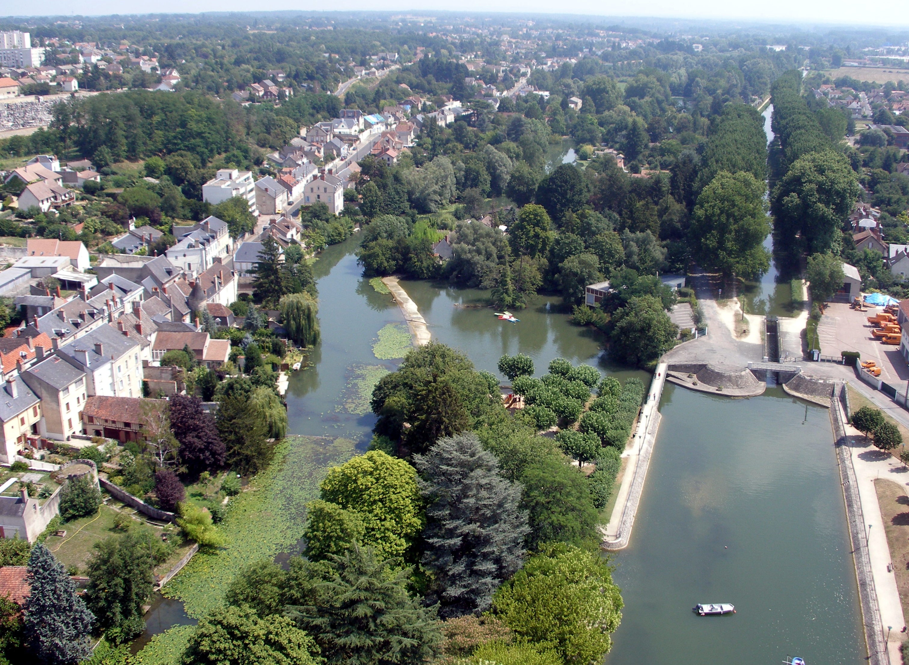 Vue aérienne de Vierzon (le Cher et le Canal de Berry)